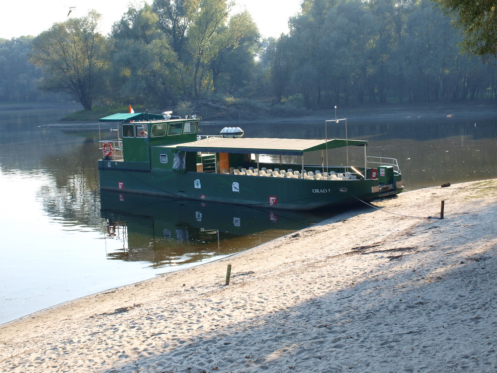 Park prirode Kopački rit u Baranji kod Osijeka.